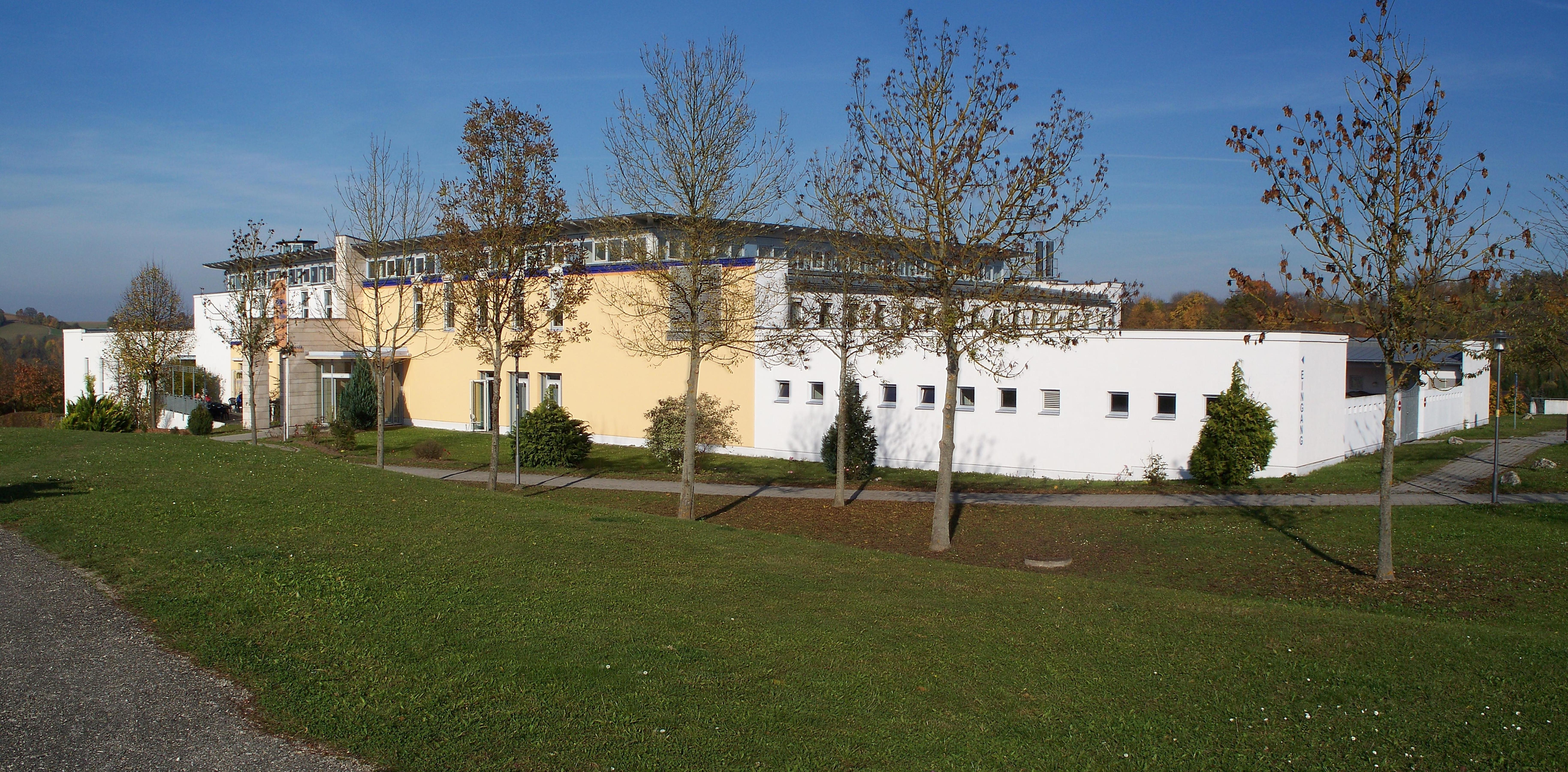 Die Kaiser-Therme im niederbayerischen Bad Abbach.